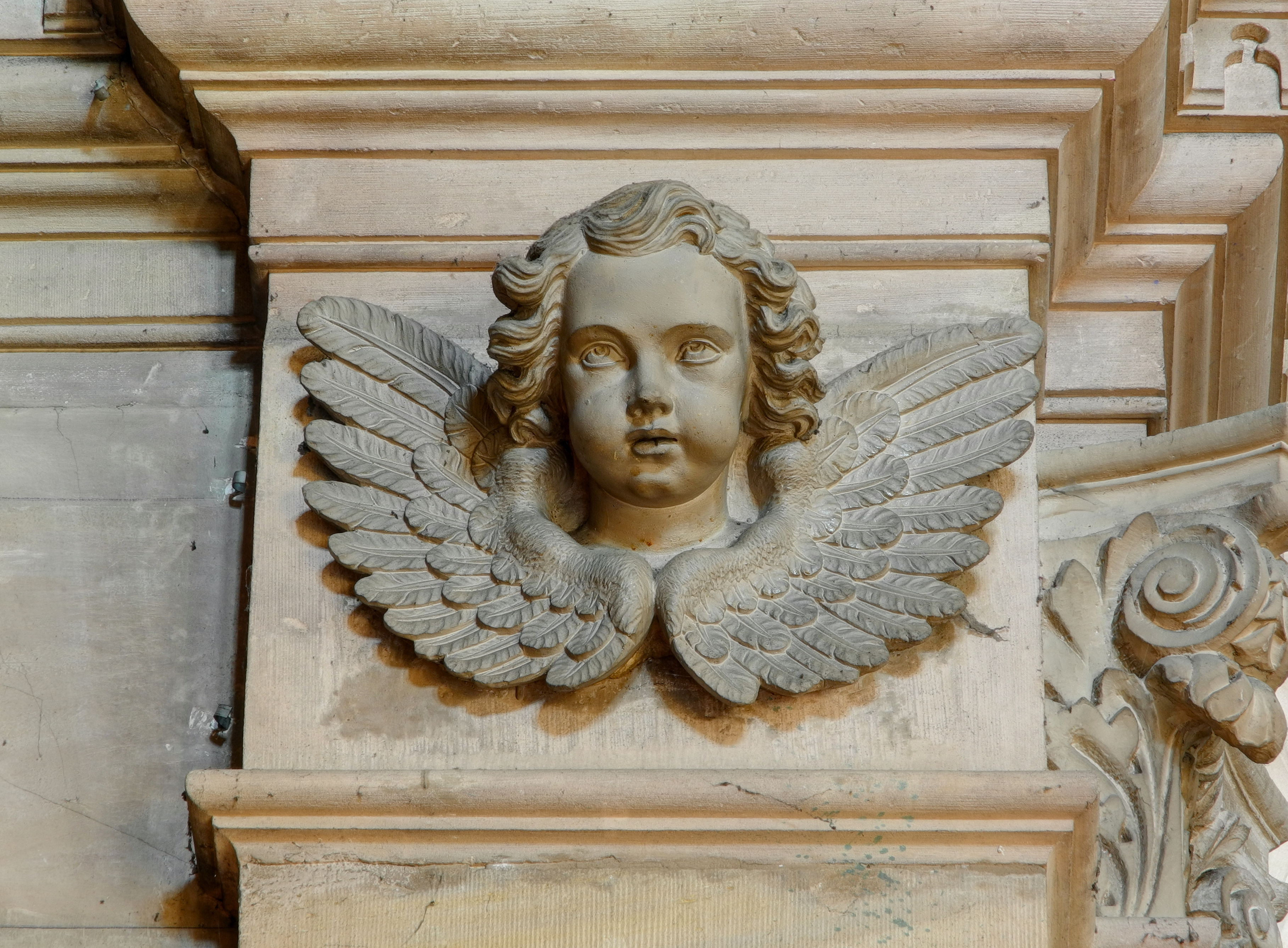 . Église Saint-Maimbœuf de Montbéliard : bas-relief (HDR). Cet édifice est classé au titre des Monuments Historiques sous le n°PA00101784.